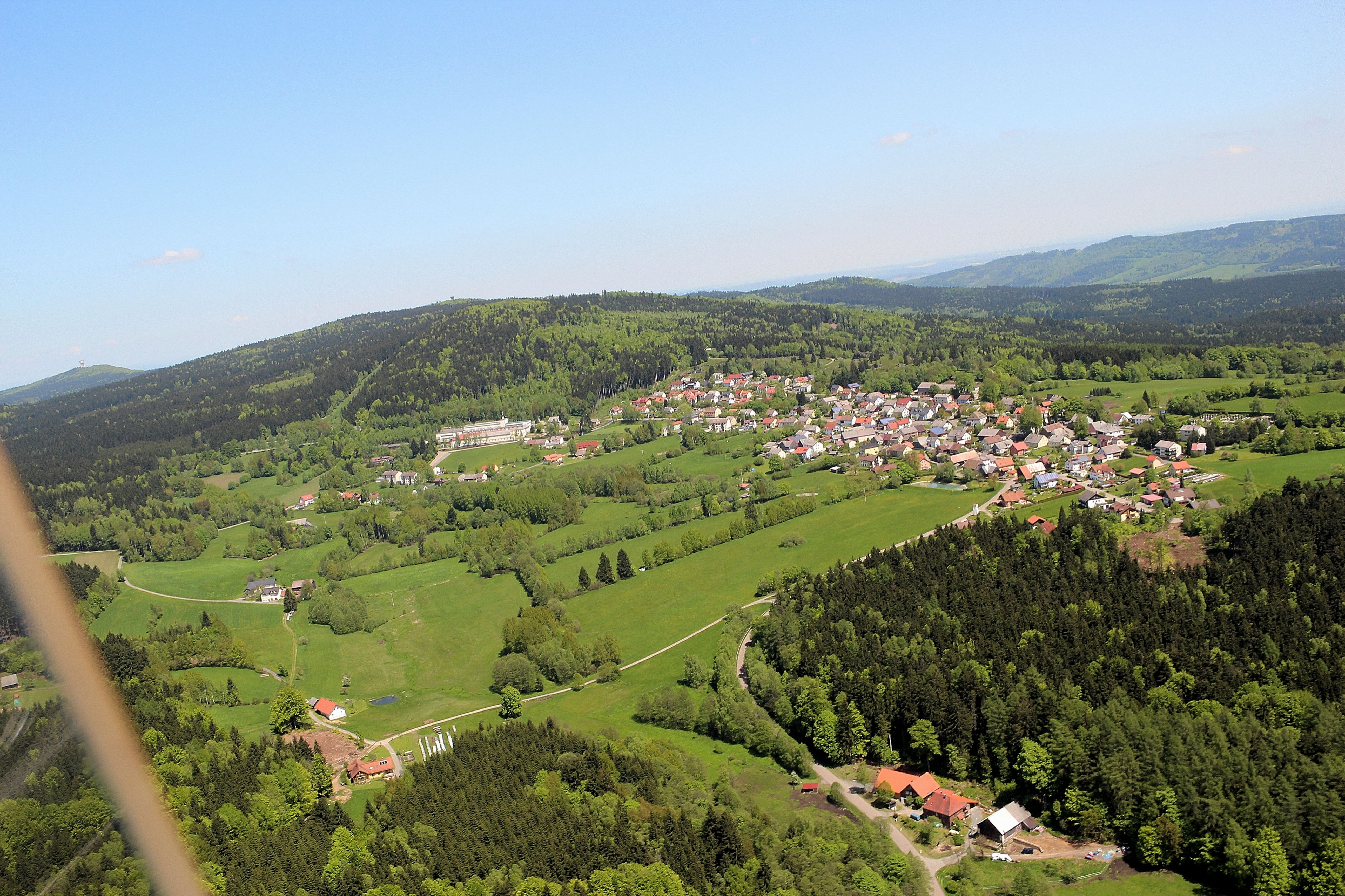 Stadlern, Landkreis Schwandorf, Oberpfalz, Bayern (2013)Am rechten unteren Bildrand ist die Stadlermühle zu sehen.